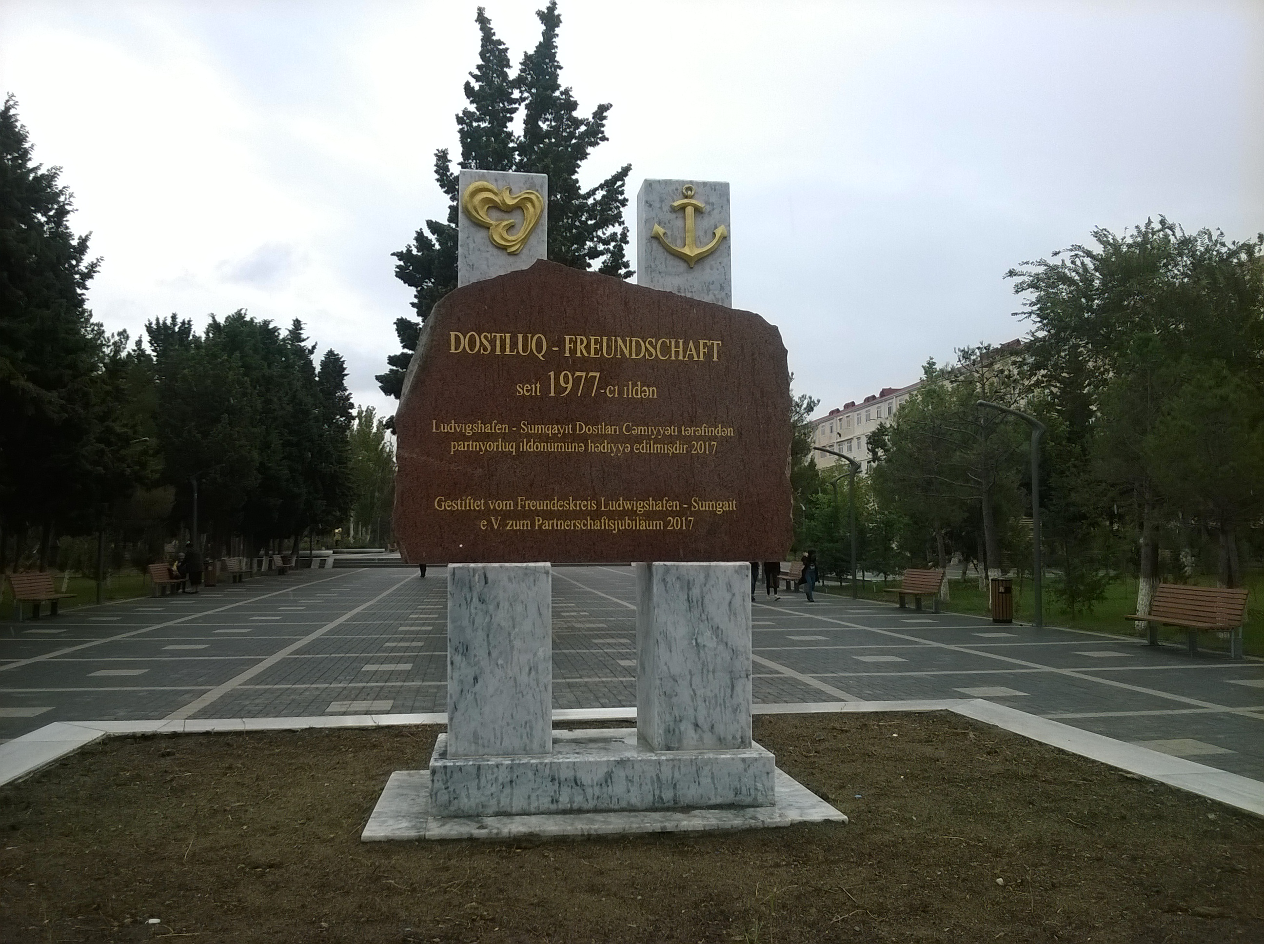 Lüdviqshafen parkı